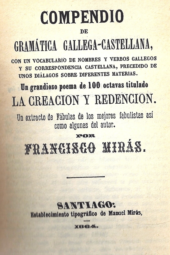 Compendio de gramática gallego-castellana